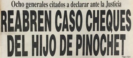 Titular de la portada del Diario La Nación que informaba “Reabren caso cheques del hijo de Pinochet”.”.«Pinocheques» es el nombre con el que se conoce un caso de corrupción en Chile ocurrido en 1989, y que tuvo como protagonistas a Augusto Pinochet Hiriart y su padre Augusto Pinochet Ugarte, líder de la dictadura militar desarrollada durante aquel periodo. También se llama así a los cheques entregados por Augusto Pinochet a su hijo, y que fueron la causa central del conflicto. El 28 de mayo de 1993, luego que el diario La Nación publicara una noticia con el titular «Reabren caso cheques del hijo de Pinochet», Pinochet inició nuevas presiones, esta vez más explícitas, reuniéndose en el Edificio de las Fuerzas Armadas, situado a unos 200 metros del Palacio de la Moneda, con oficiales del Ejército escoltados por soldados armados y vestidos con trajes de combate, por cuyas boinas negras al suceso se le conoció como «el boinazo». Aylwin se vio obligado nuevamente a ceder.